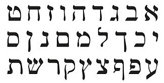 Hebrew Alphabet